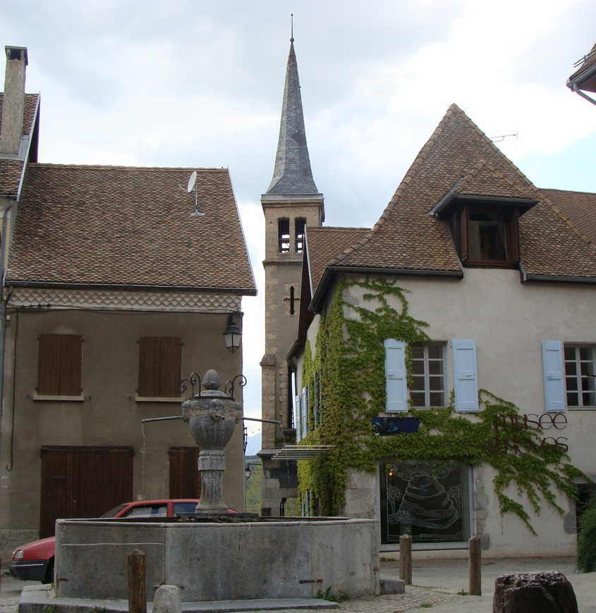 Mens (Isère): le clocher du temple vu de la place du marché. Au premier plan, la fontaine.